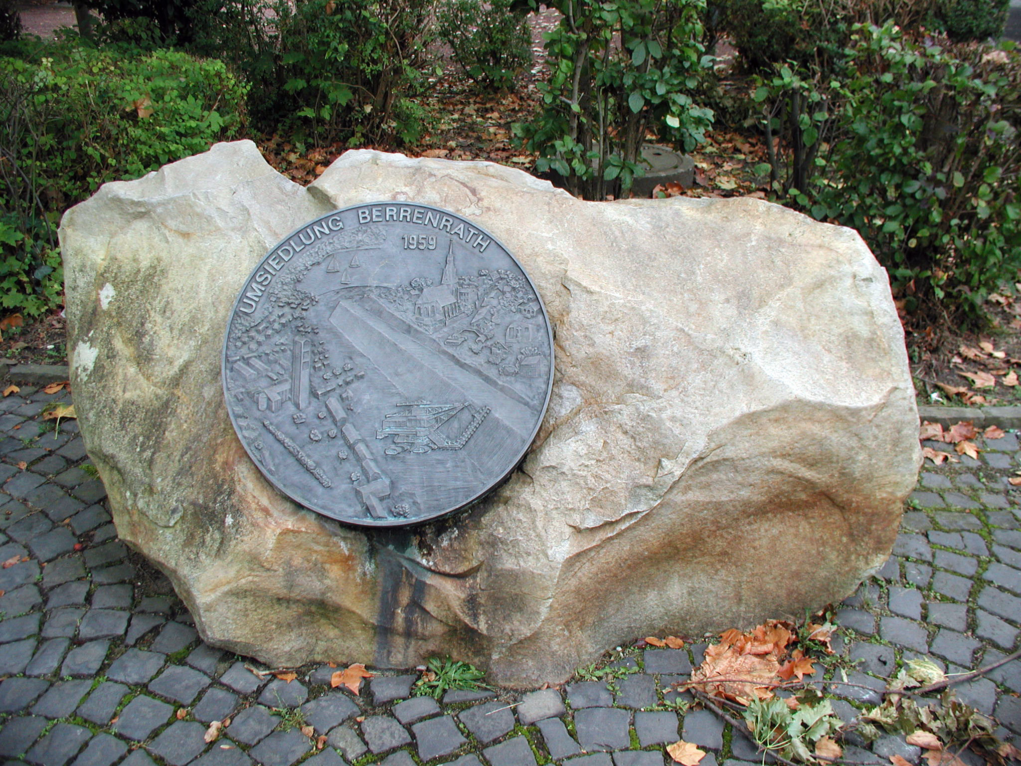 Hürth-Berrenrath, Gedenkstein Umsiedlung 1959